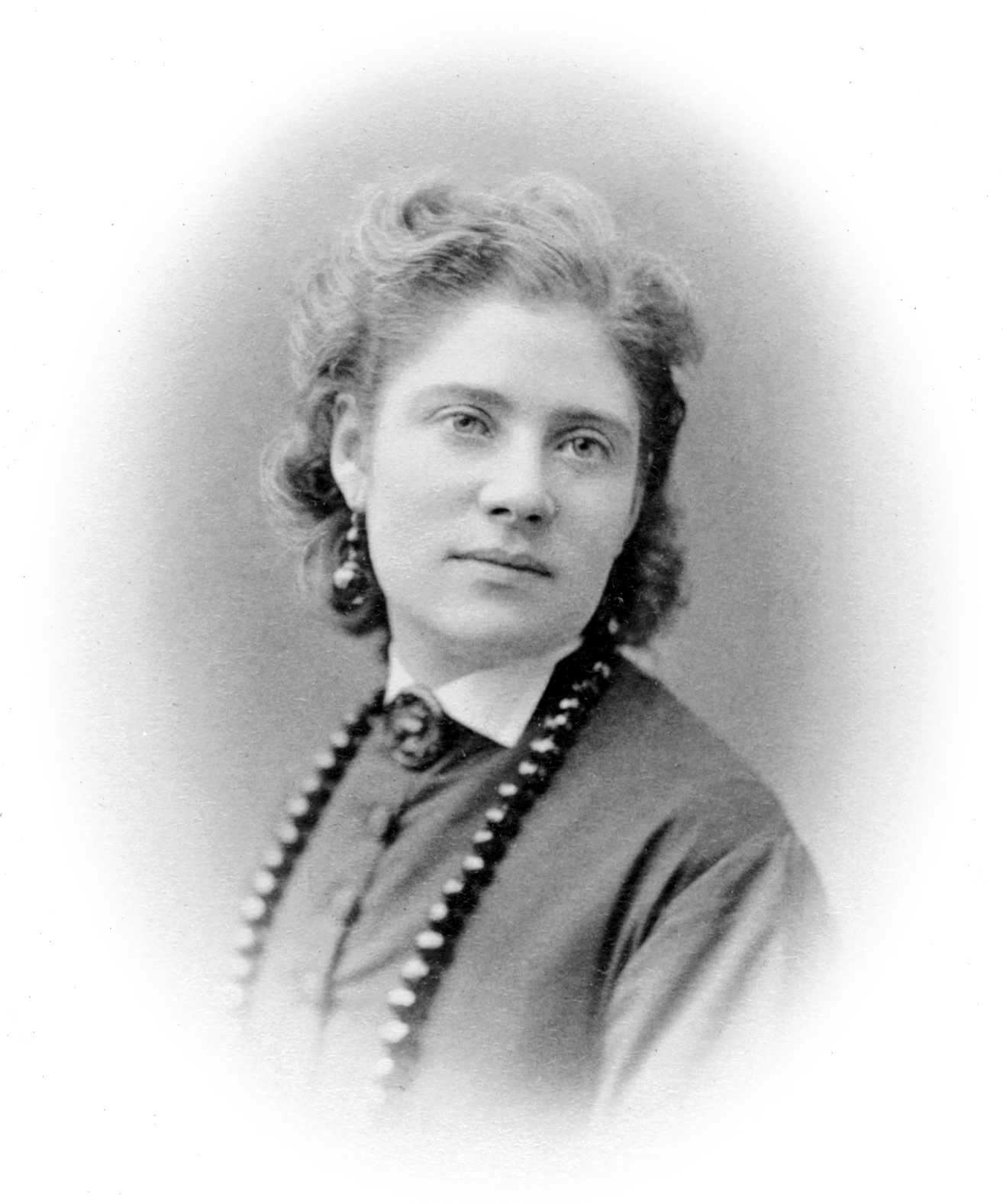 Wilhelmina Söhrling, sångare vid Kungliga Operan 1872